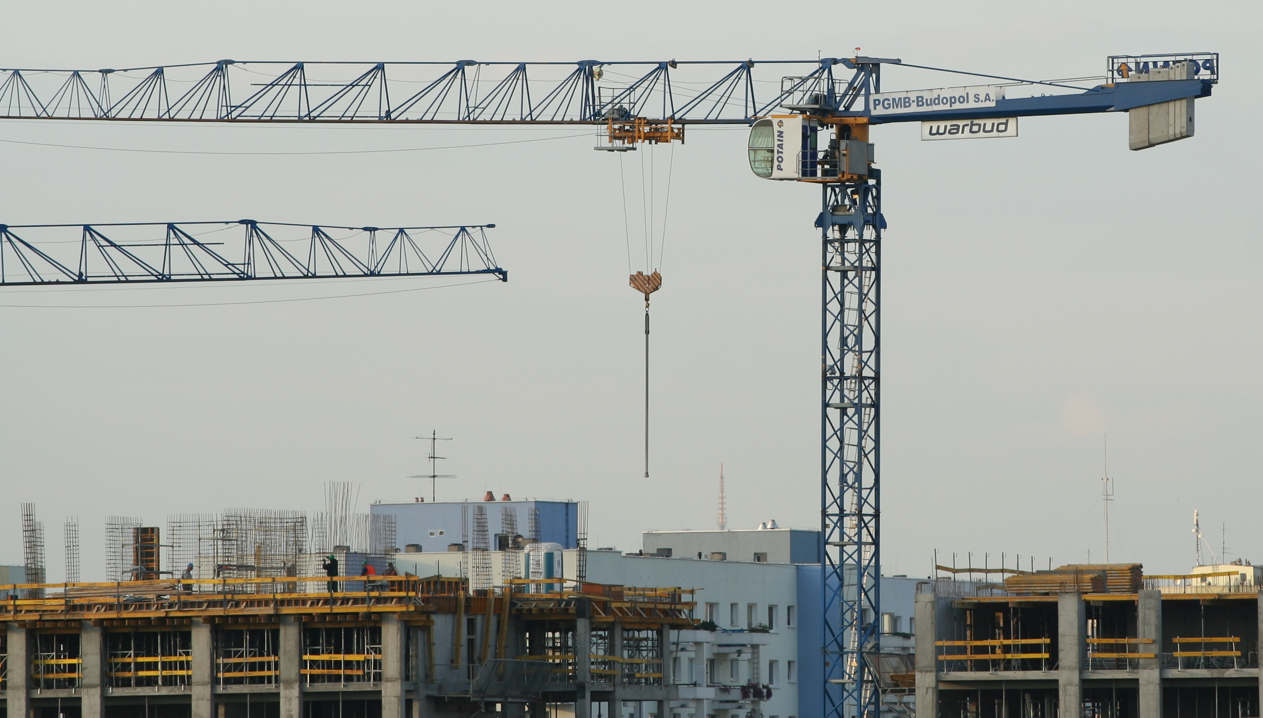 Dźwig używany przez firmę Warbud